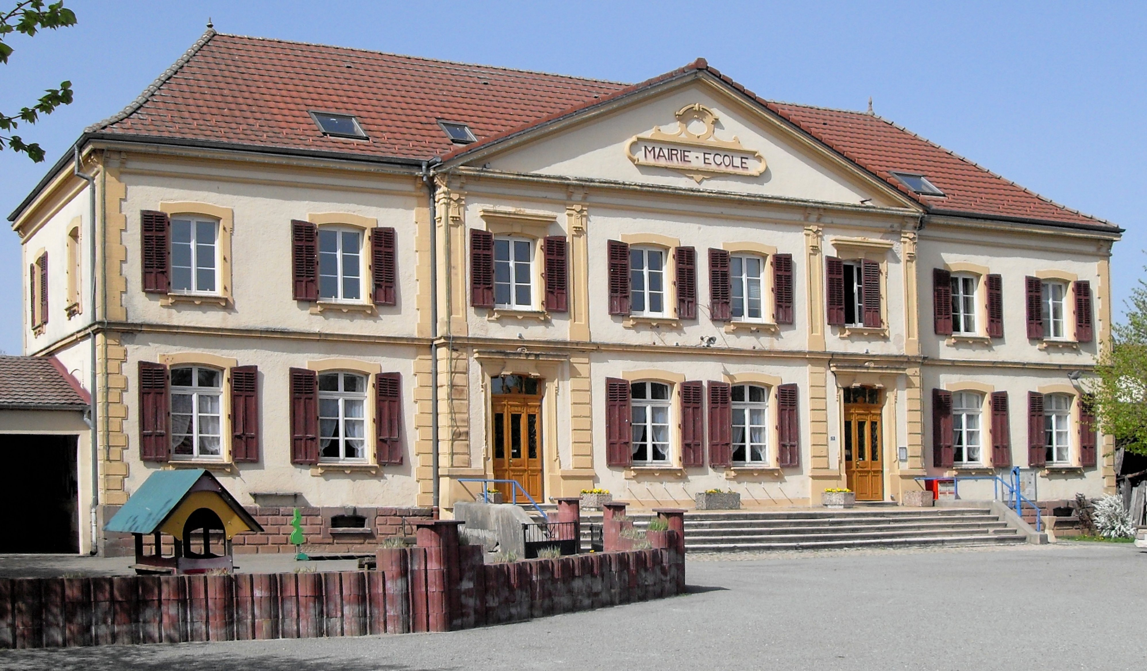 La mairie-école de Lachapelle-sous-Rougemont